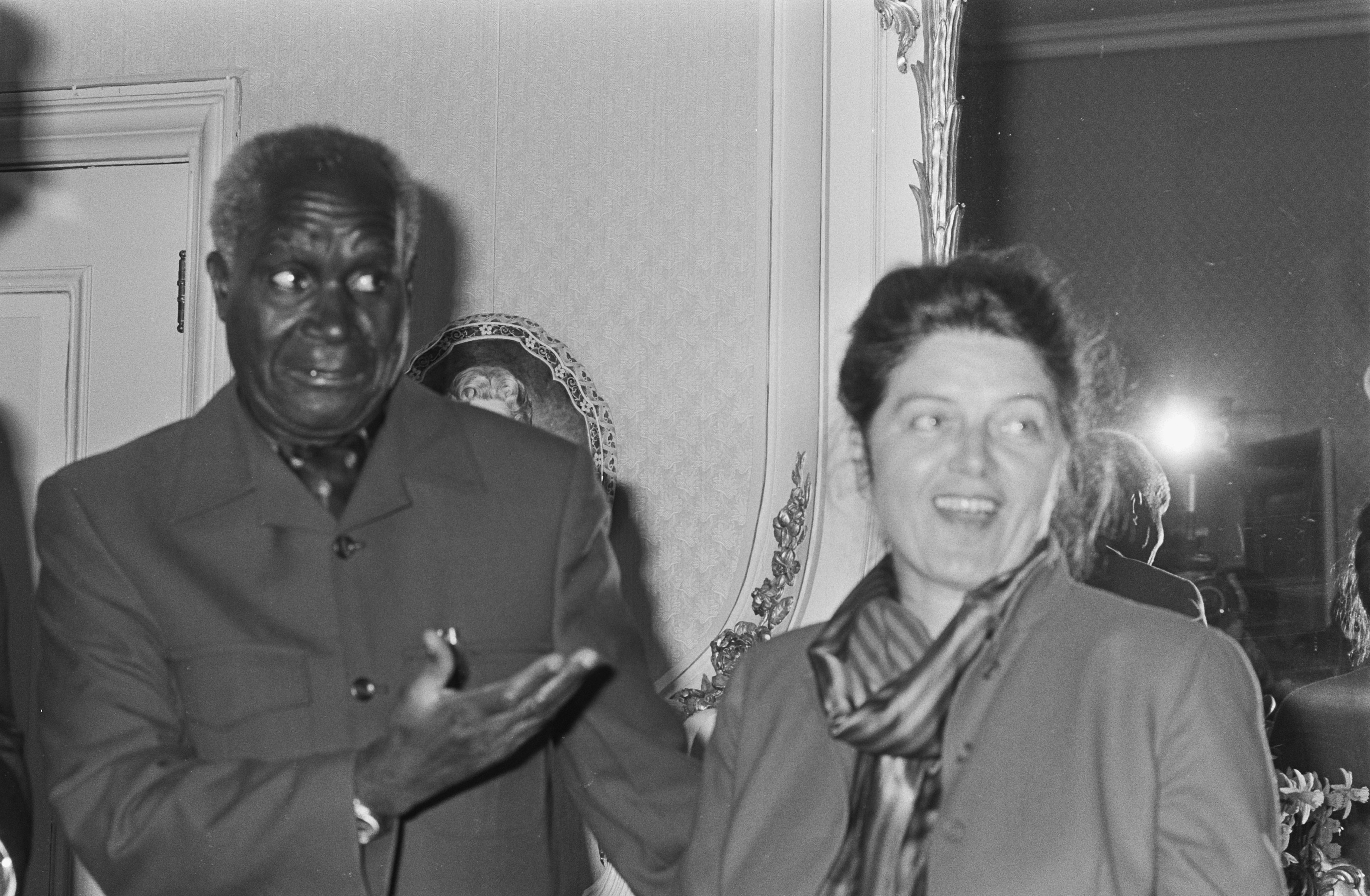 Collectie / Archief : Fotocollectie Anefo Reportage / Serie : [ onbekend ] Beschrijving : President Kaunda van Zambia op bezoek bij premier Lubbers op Catshuis; president Kaunda en minister Schoo Datum : 14 april 1986 Locatie : Zambia Trefwoorden : bezoeken Persoonsnaam : Kaunda, Kenneth, Schoo, Eegje Fotograaf : Croes, Rob C. / Anefo Auteursrechthebbende : Nationaal Archief Materiaalsoort : Negatief (zwart/wit) Nummer archiefinventaris : bekijk toegang 2.24.01.05 Bestanddeelnummer : 934-7251